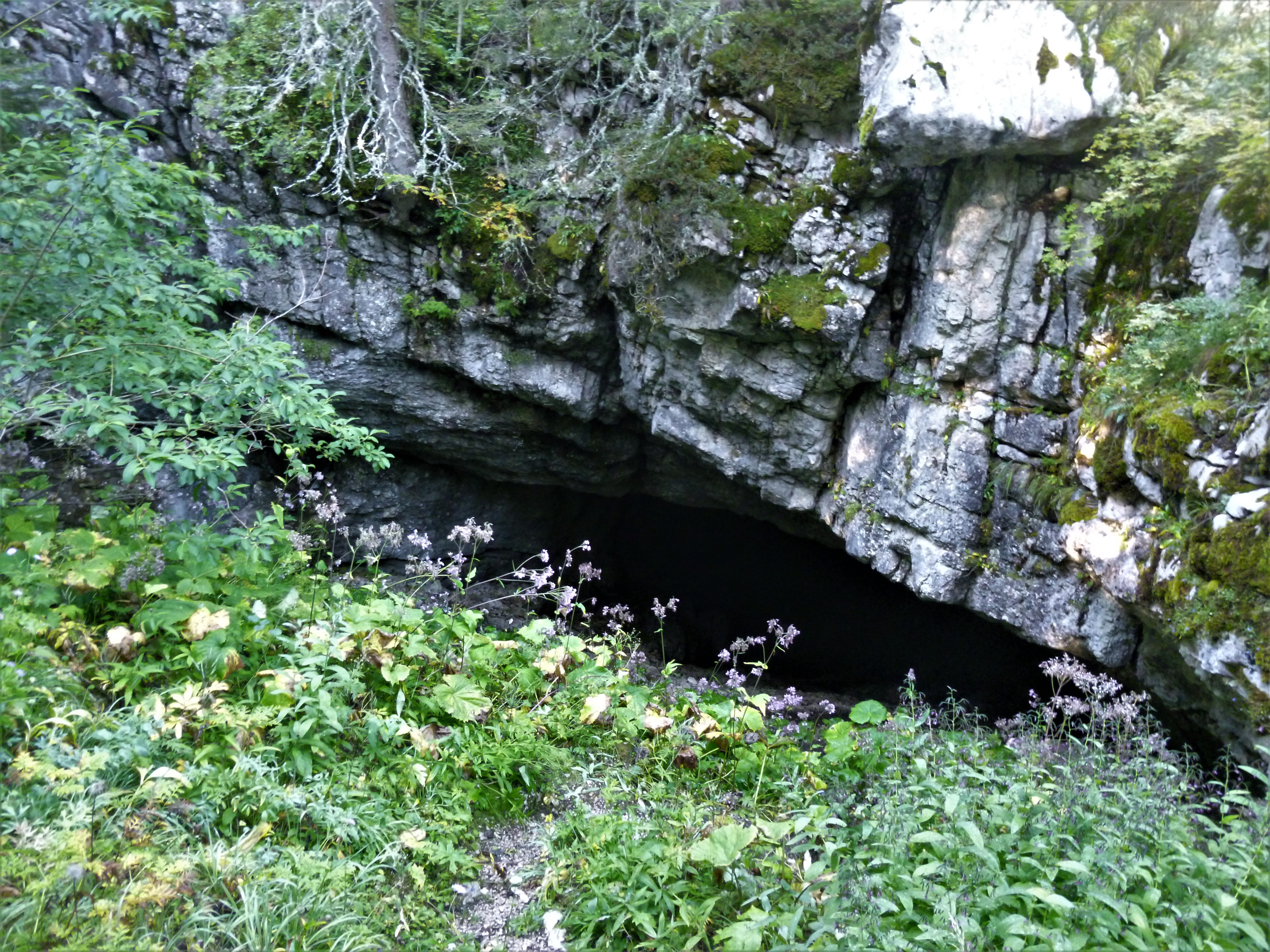 L'entrée de la Combe de Fer donne accès a un important réseau souterrain.